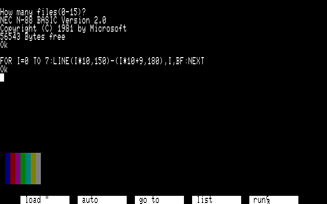 NEC N-88 Basic 2.0起動後にグラフィック描写